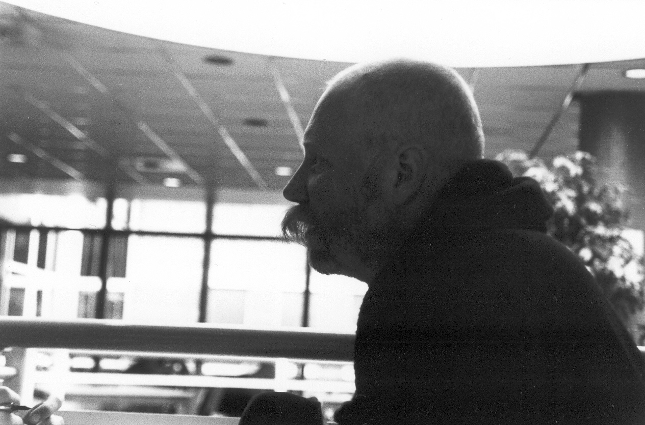 Piet Gerbrandy